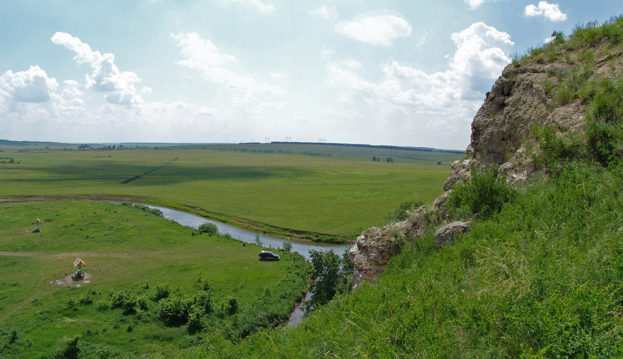 РБ Новомусино Голубое озеро (3)